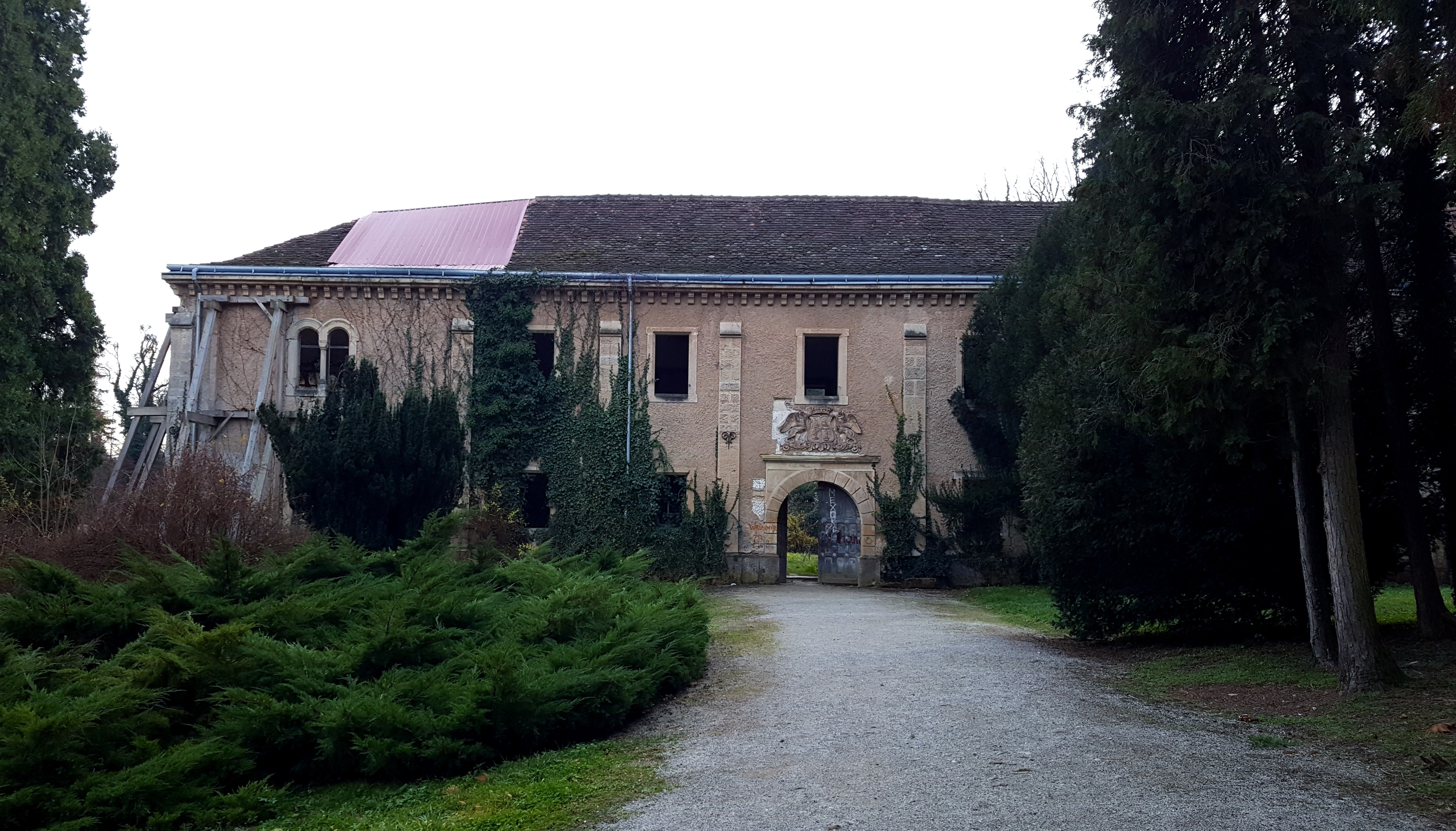 Arboretum Opeka